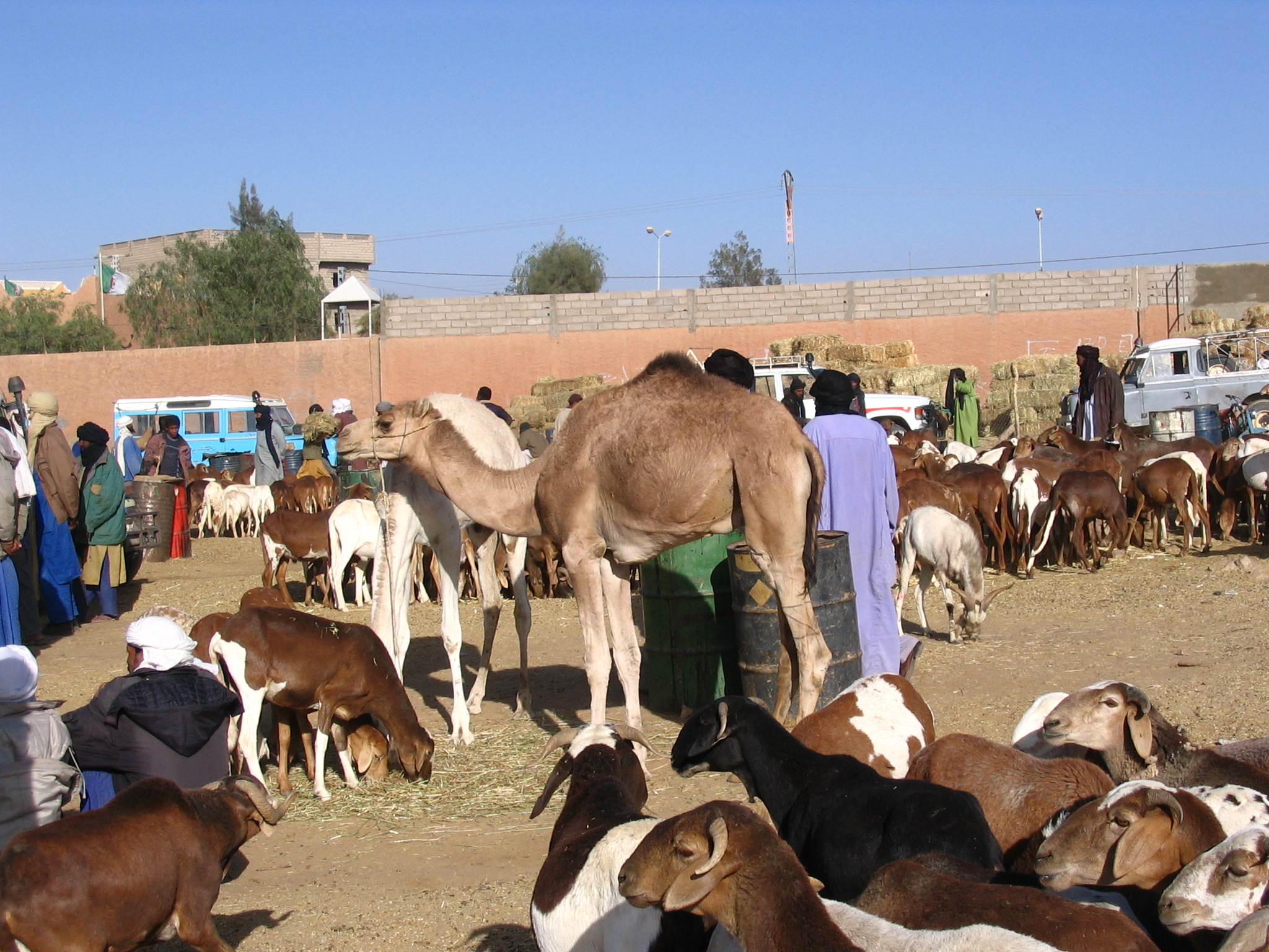 Marché aux bestiaux Tmaa, Algérie